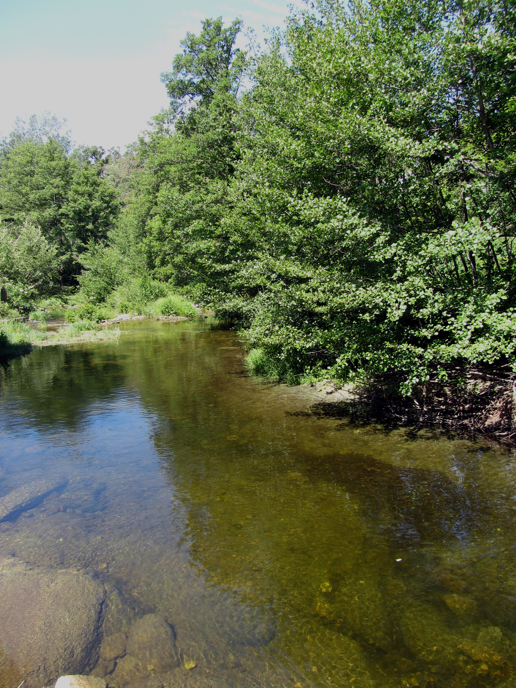 El riu Anyet a l'alçada del paratge de la Font Pudosa, pocs metres més enllà del poble de Sant Climent Sescebes. Forma part de la conca de la Muga.